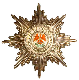 Roter Adler Orden, Bruststern zur 1. Klasse. Silber, das Medaillon mit goldener Schrift emailliert, Emaillemalerei.